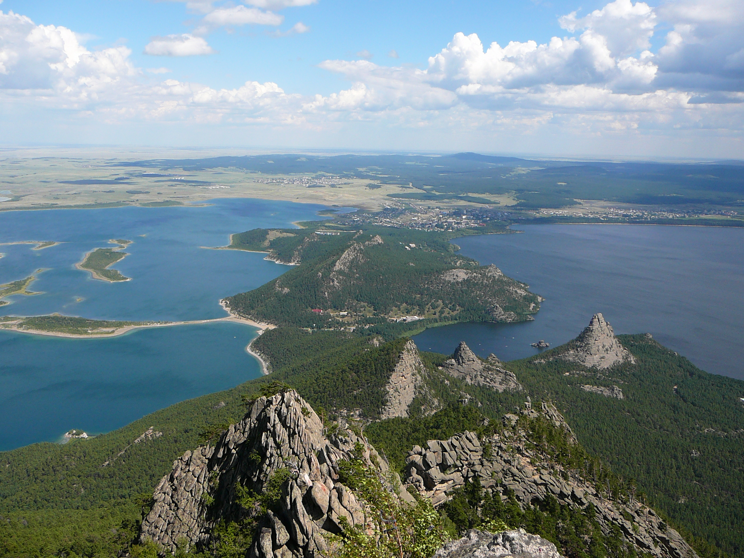 Вид с горы Кокшетау (второе название - гора Синюха - 947 метров над уровнем моря, от уровня озера - 620 метров) - на Перешеек между озером Боровое и Большое Чебачье. На дальнем плане перешейка начинается посёлок Боровое.